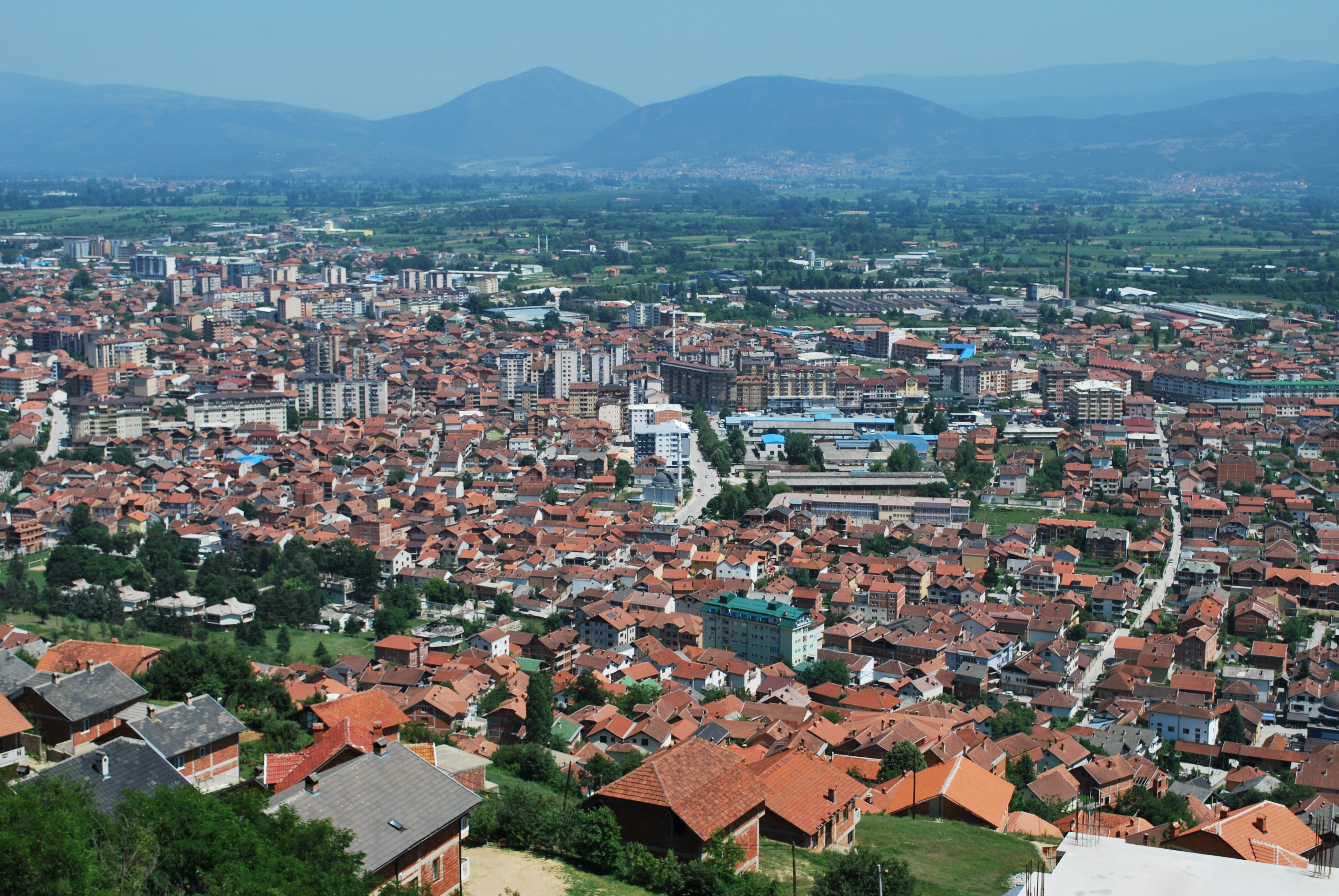 Tetovo, Macedonia